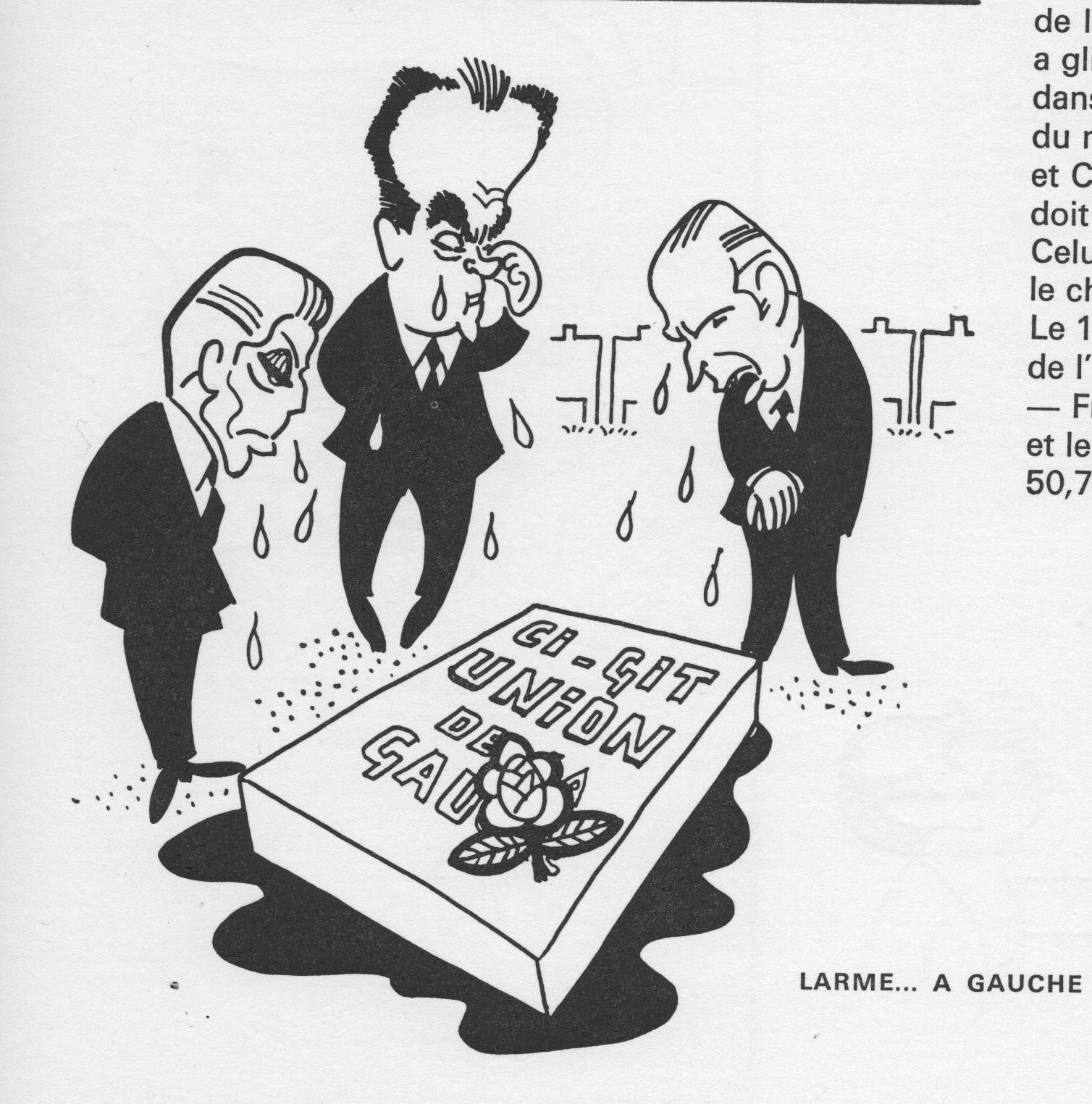 recueil de dessins et caricatures paru en 1980